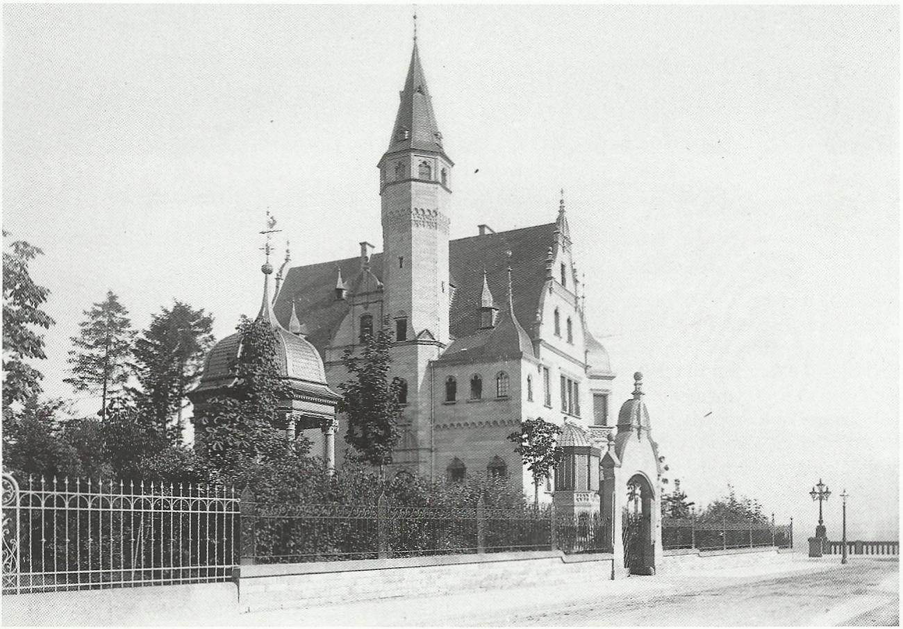 Villa Spiritus, Bonn: Ansicht von Südwesten kurz nach Fertigstellung